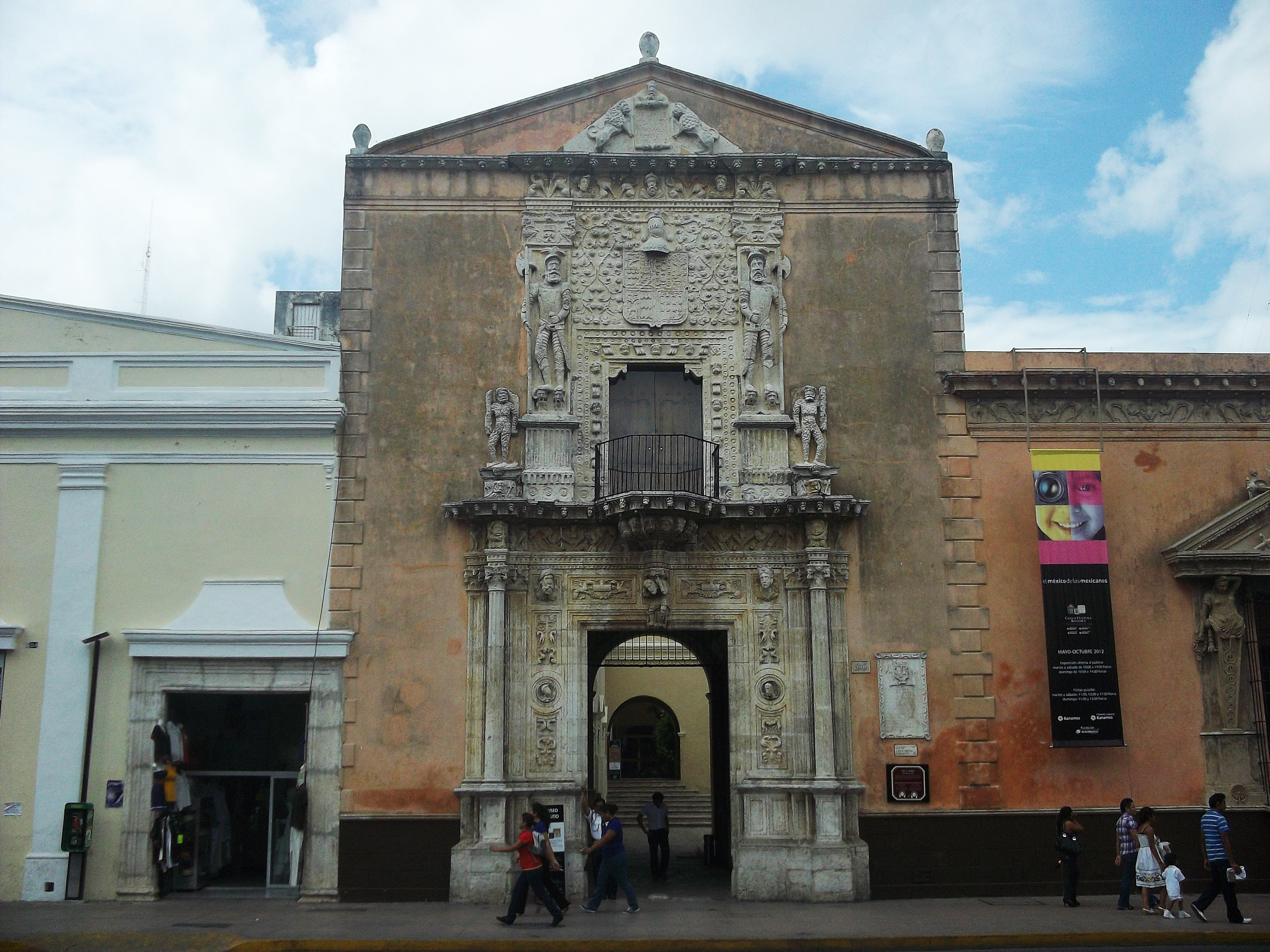 Casa de los Montejo en Mérida, Yucatán.